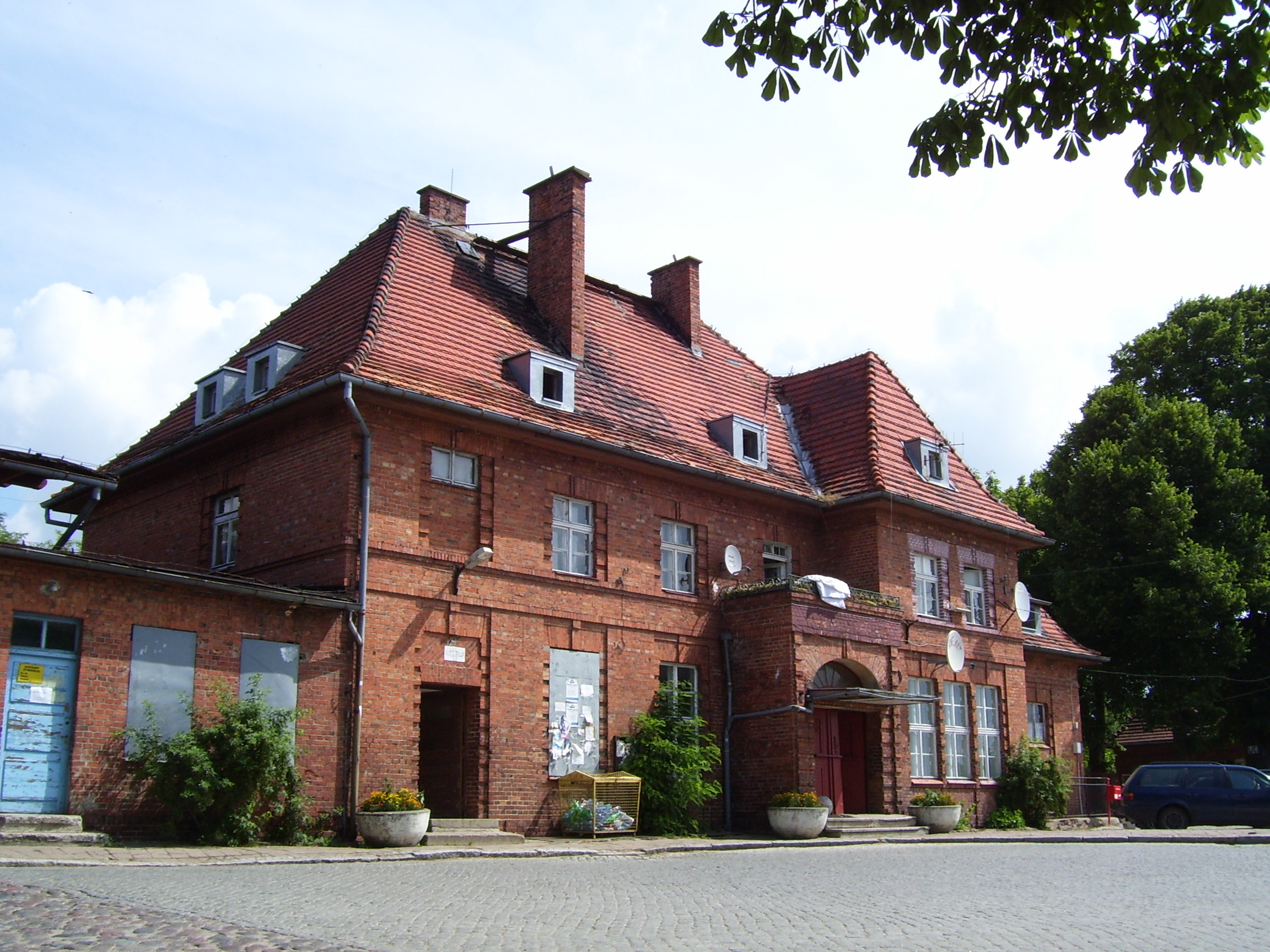 Dawny budynek dworca kolejowego w Reszlu, ul. Kolejowa 28